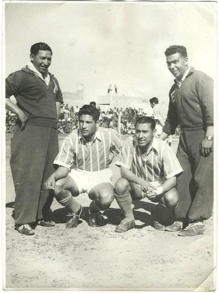 Gregorio Garín y Domingo Rafael Godoy, dos de los máximos ídolos de Godoy Cruz que brillaron en la década del '40 y ´50. (Foto 1951).